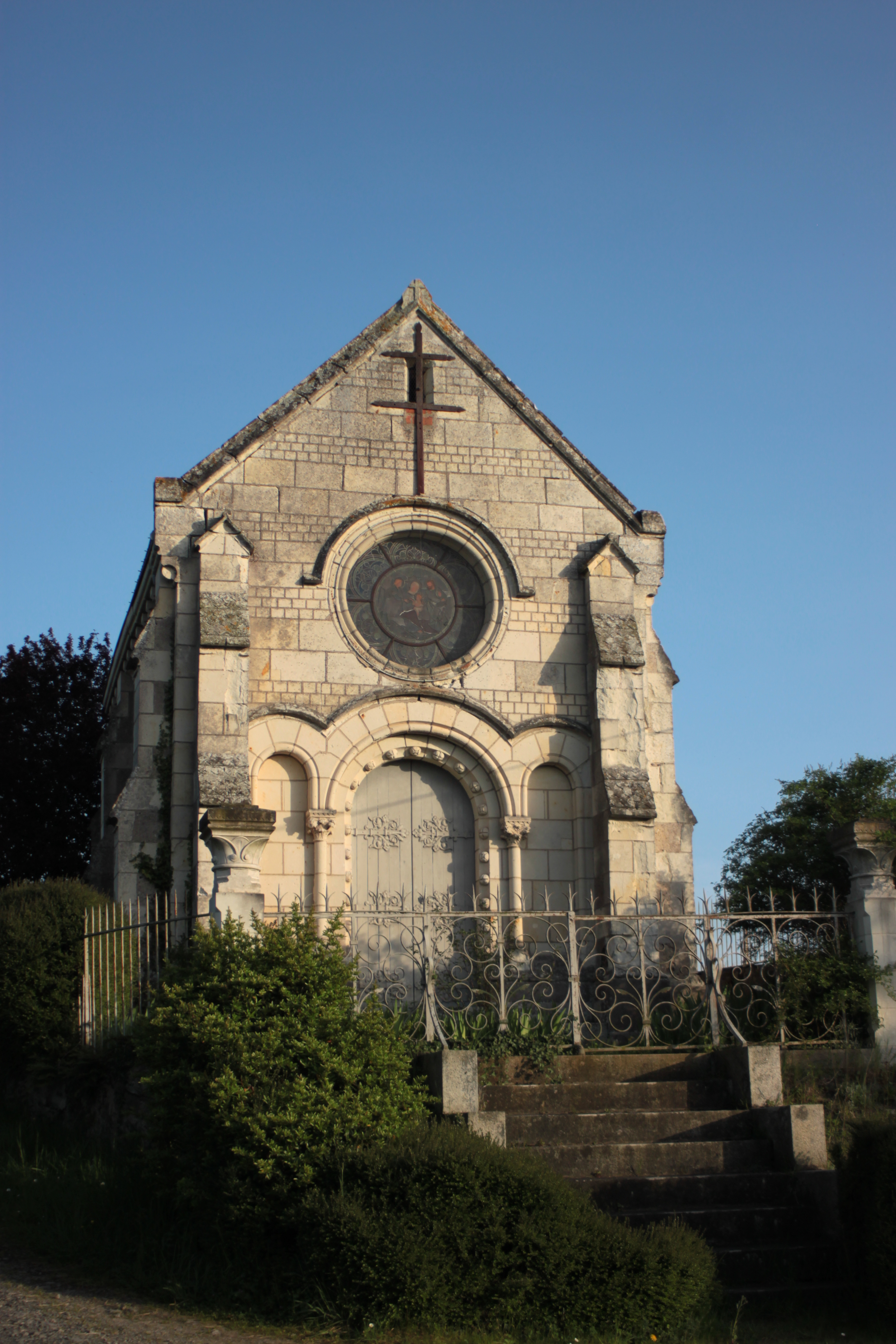 Chapelle Saint-Joseph, Fr-49-Denée.